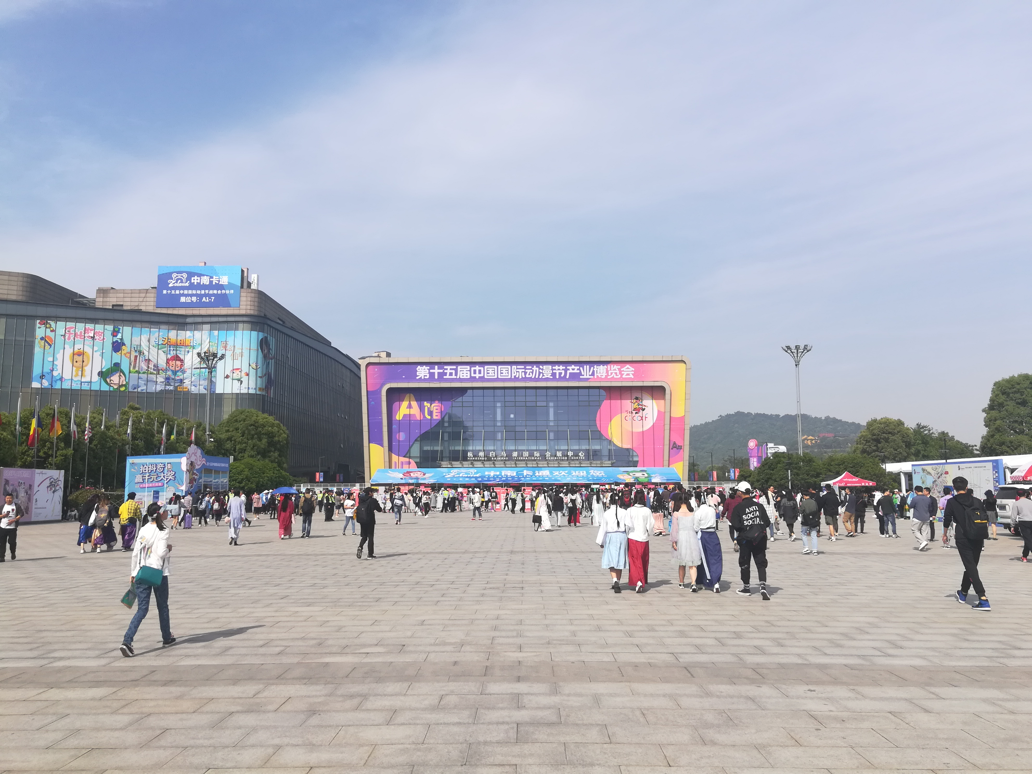 中文（中国大陆）: 第15届中国国际动漫节会场，拍摄于杭州（滨江）白马湖动漫广场